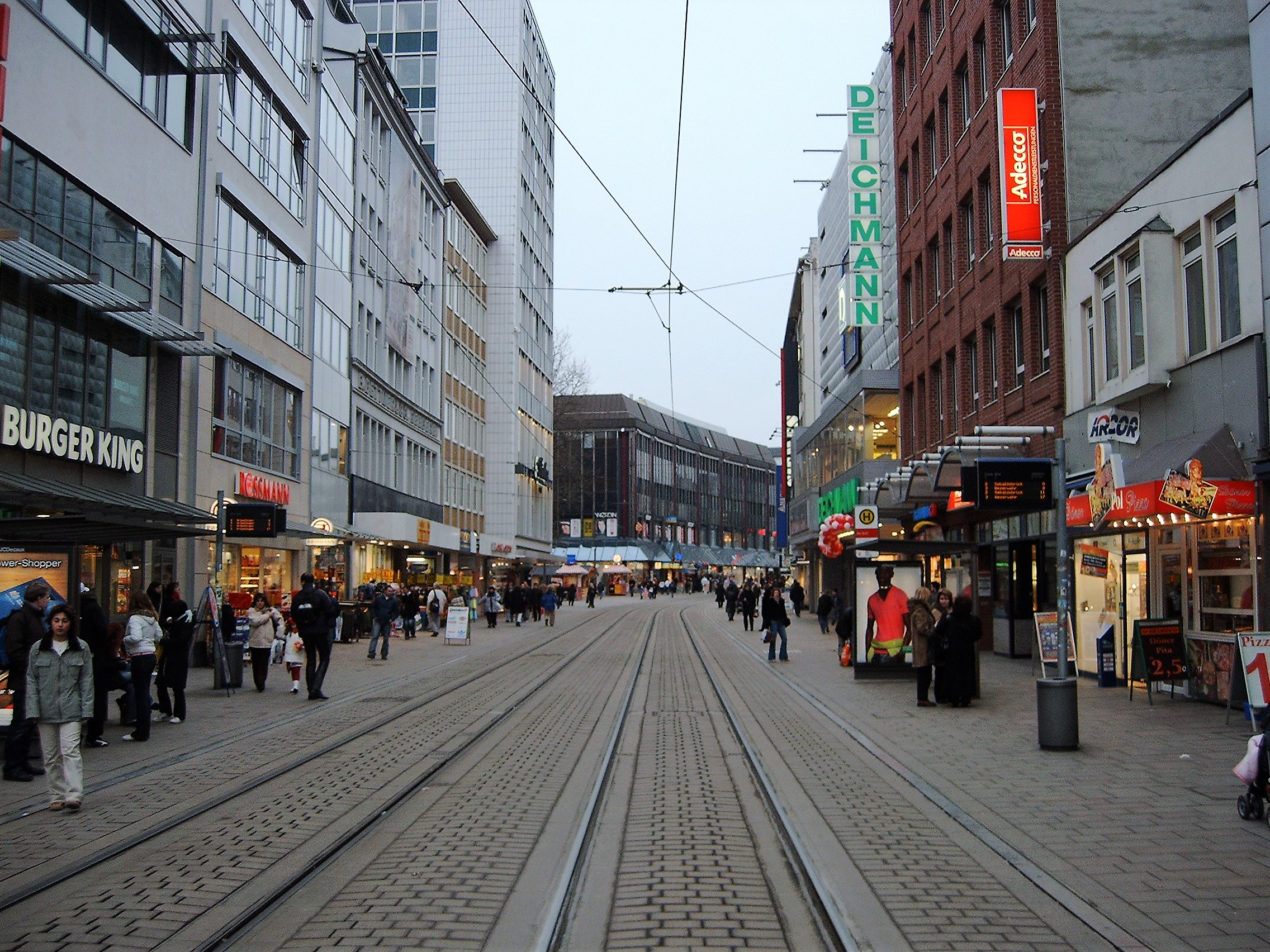 Hutfilterstraße Bremen; Blickrichtung Osten